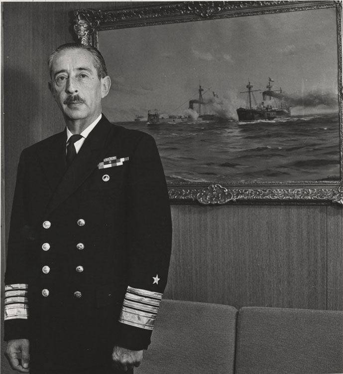 José Toribio Merino Castro, Miembro de la Junta de Gobierno de Chile (1973 - 1990).